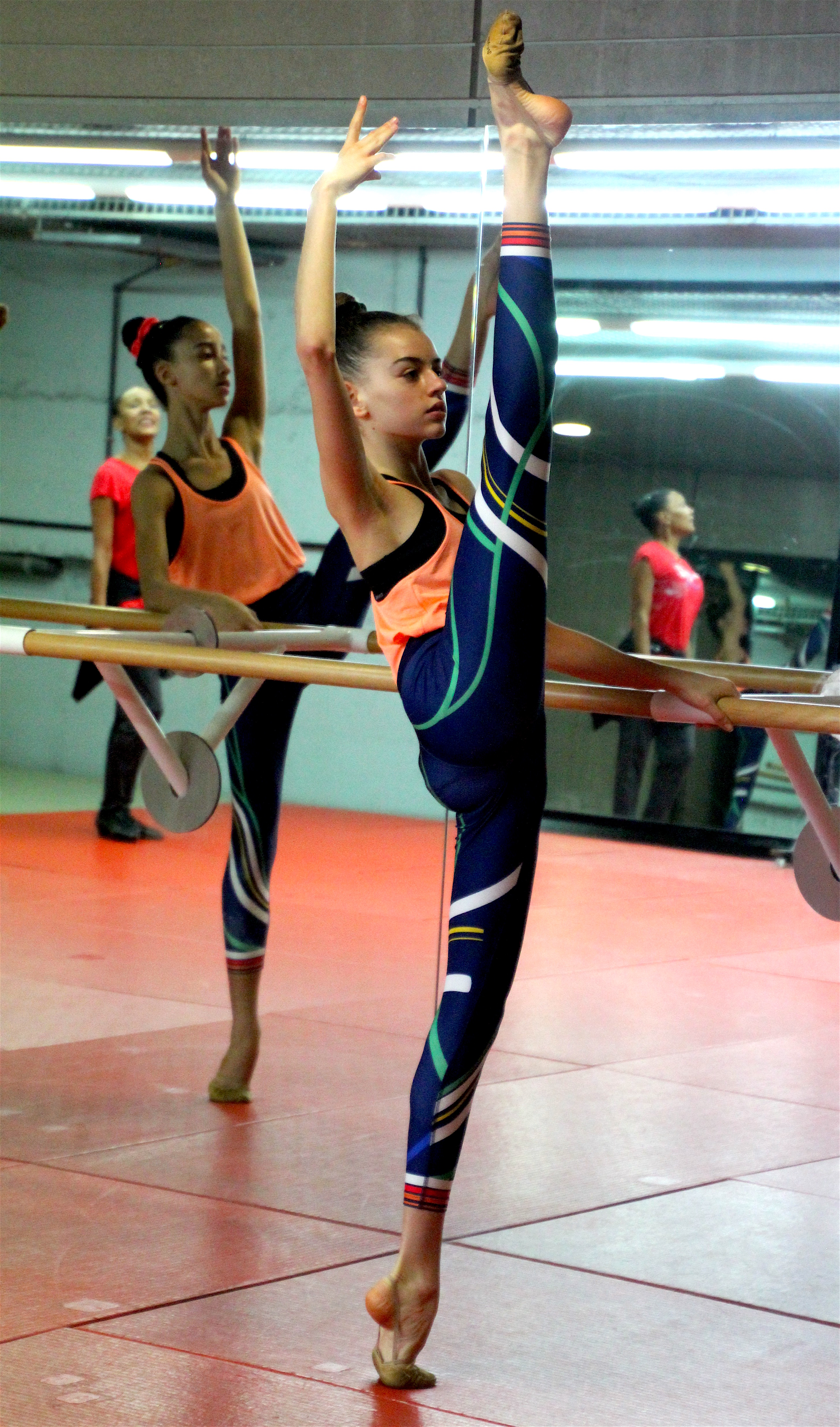 Ángela Corao entrenando con el conjunto español júnior de gimnasia rítmica en el CAR de Madrid en mayo de 2017.